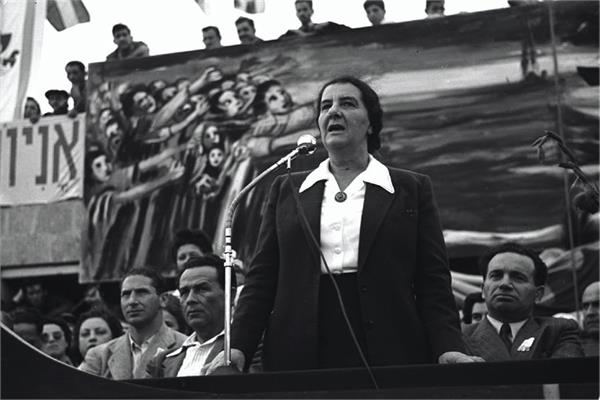 חיפה - חגיגת יום הים - הגב' גולדה מאיר מברכת